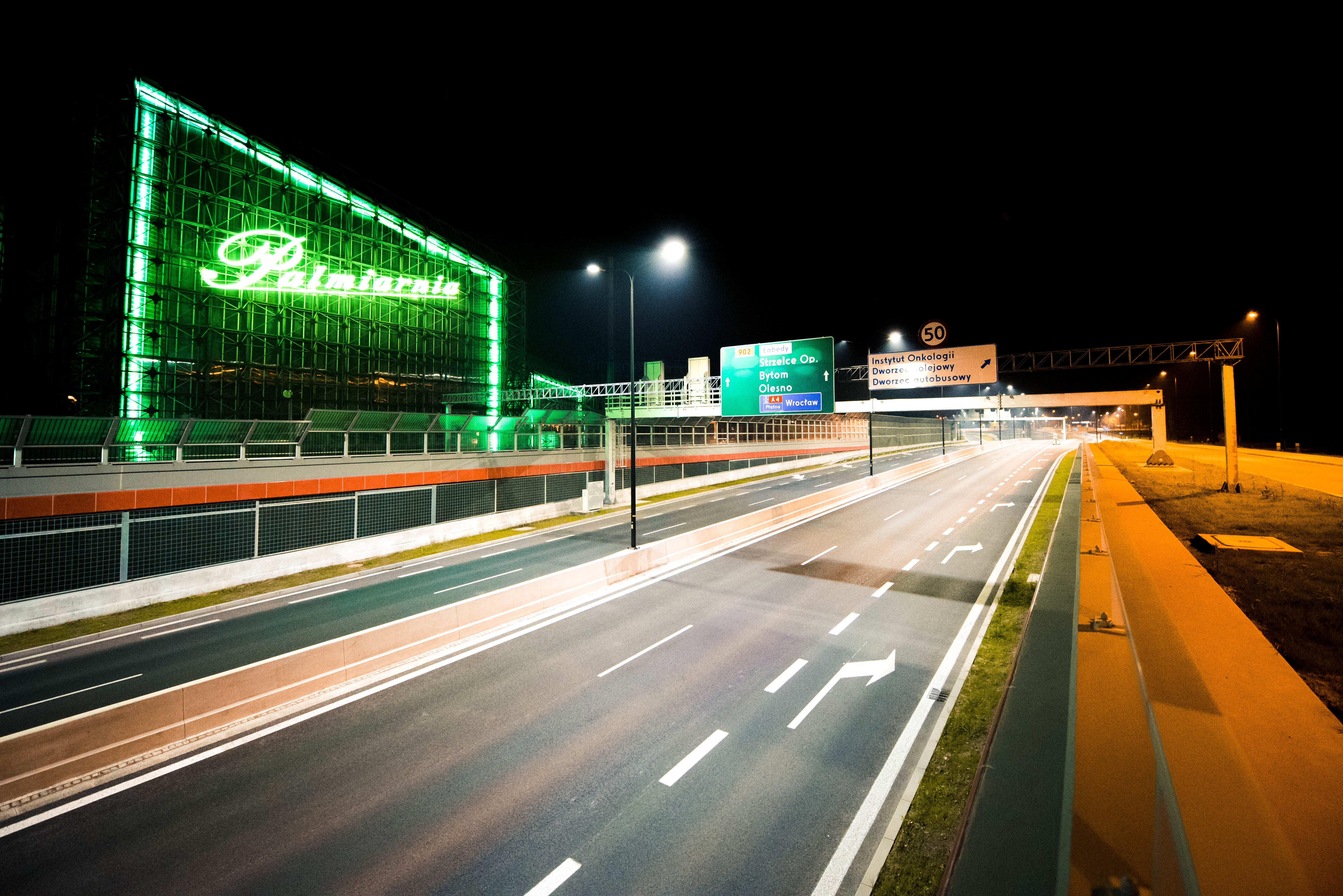 Drogowa Trasa Średnicowa, Palmiarnia w Gliwicach